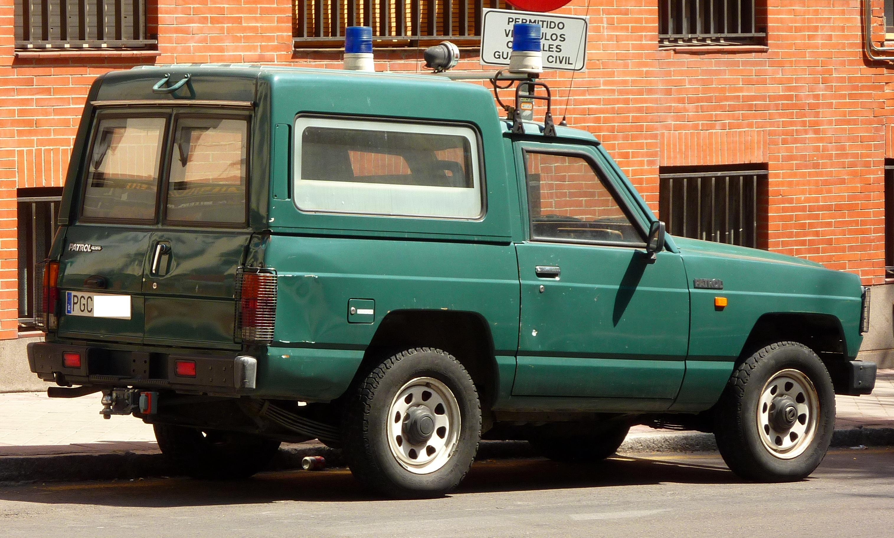 Nissan Patrol corto de la Guardia Civil.